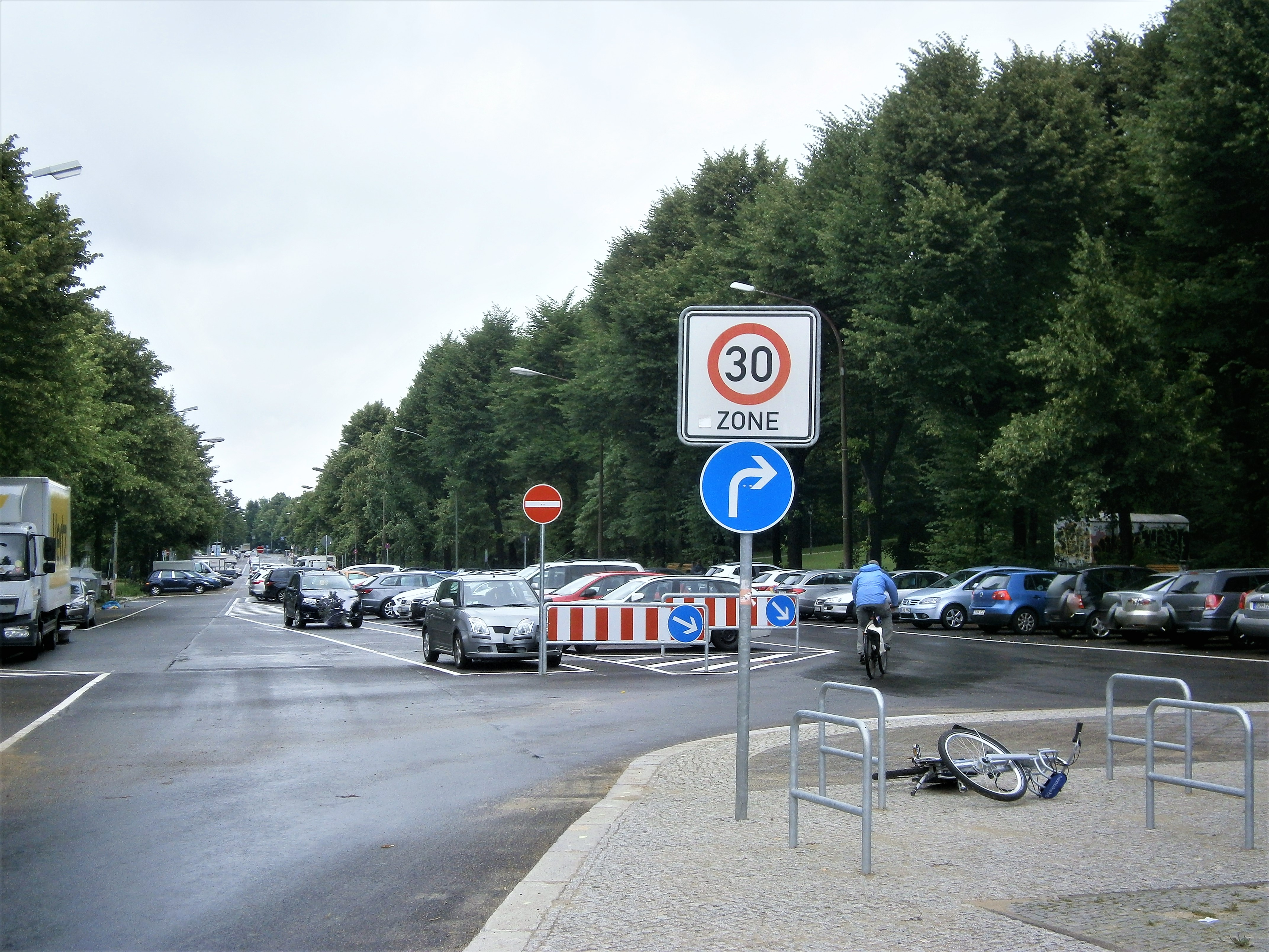 Die Friedenstraße ist eine Straße im Berliner Bezirk Friedrichshain-Kreuzberg, Ortsteil Friedrichshain. Angelegt und benannt wurde sie 1871-1876 auf dem Communicationsweg außerhalb der abgerissenen Berliner Zollmauer. Bereits seit dem Anlegen und der Bebauung bestand eine Teilung der Straße auf Königstadt und Stralauer Viertel. Aktuell sind es drei unterschiedene Straßenabschnitte: regionale Straßenverbindung im Barnimkiez am Volkspark Friedrichshain, am Platz der Vereinten Nationen als Parkzone, südlich im (Planungsraum) "Friedenstraße" als Ergänzungsstraße. Im Bild der mittlere als Parkzone ausgebildete Abschnitt am Platz der Vereinten Nationen entlang nach Nordwesten mit Richtungsfahrbahnen.